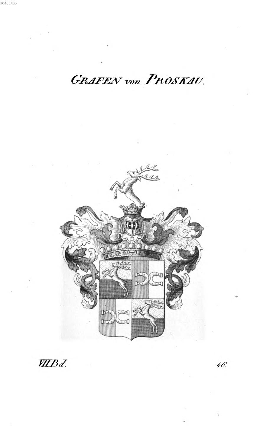 Wappen Proskau - Tyroff AT.jpg